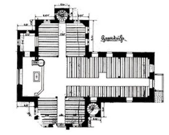 Grundriss der Ev. Kirche in Lützellinden, Gießen, Hessen, Deutschland